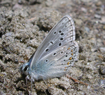 Bläuling, wird nach Bestimmung neu hochgeladen